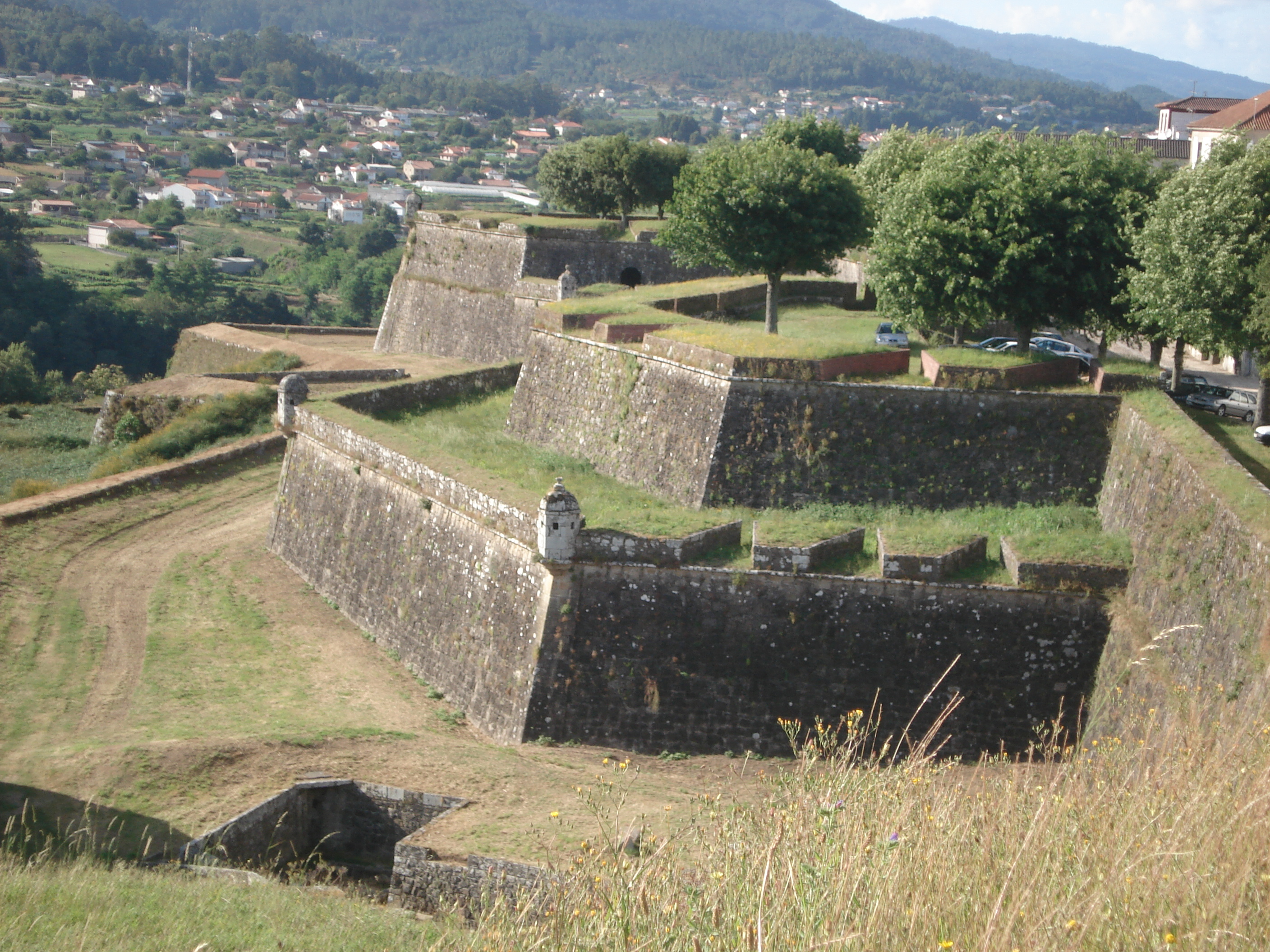 3 Muralhas da Fortaleza de Valença umas por cima das outras.